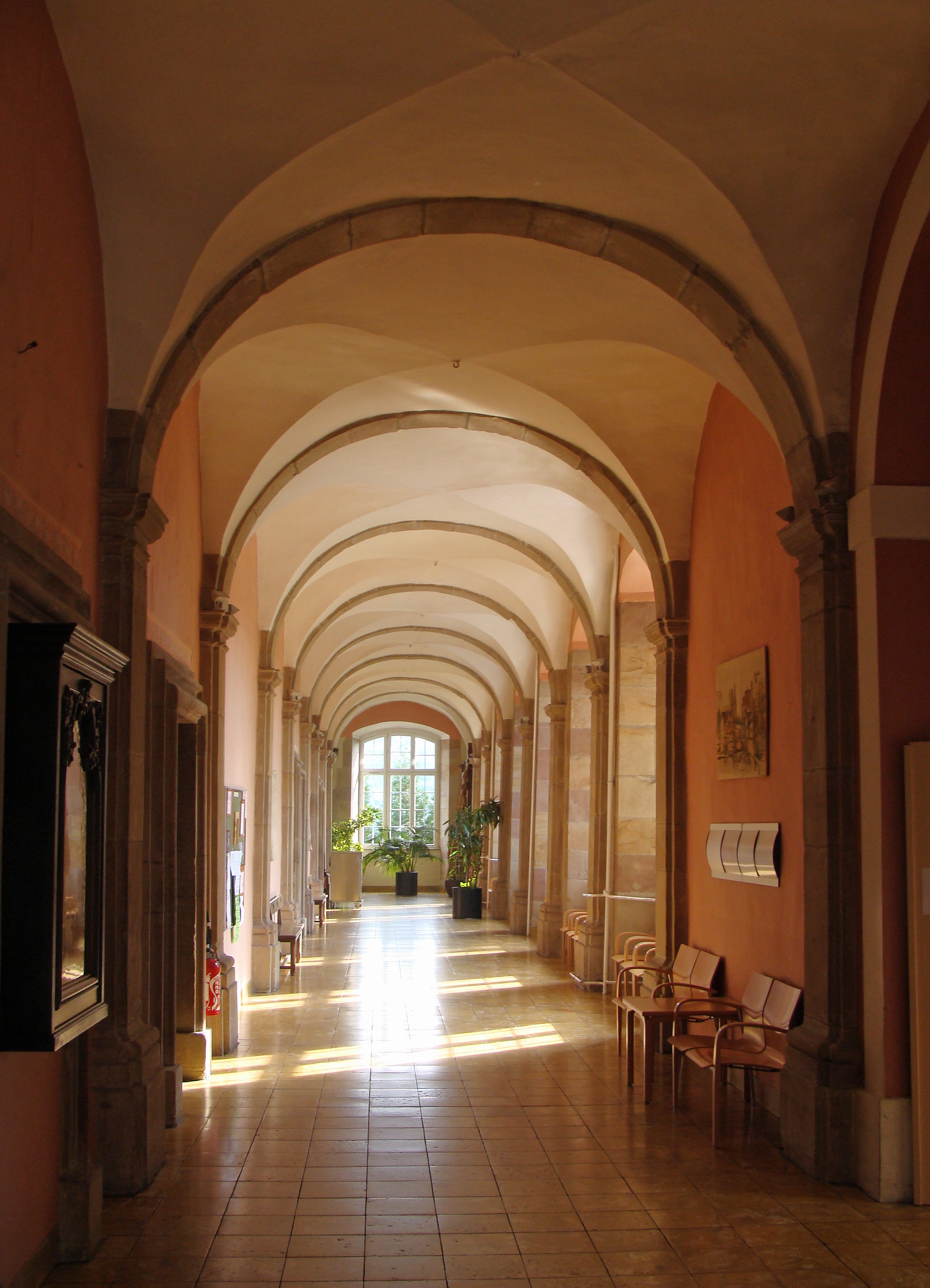 . Vue de la grande galerie (Sud). Abbaye située à Longeville-lès-Saint-Avold.